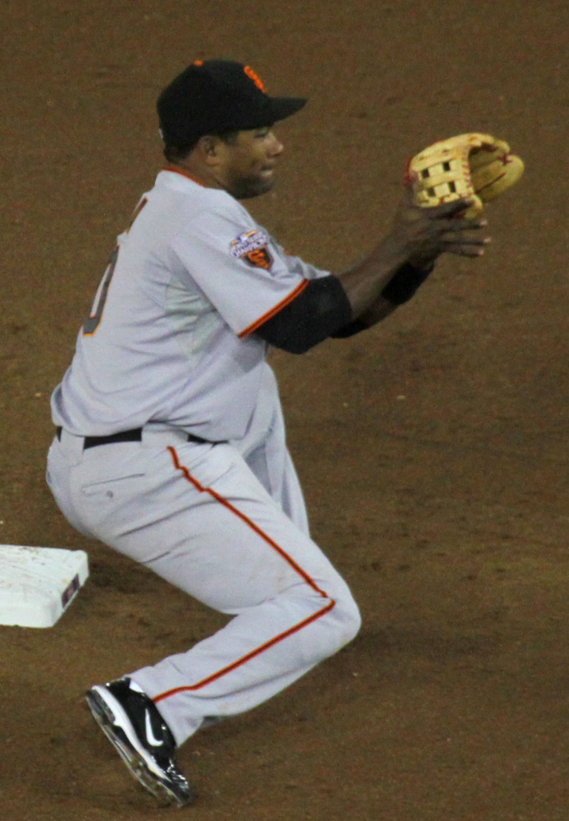 Miguel Tejada